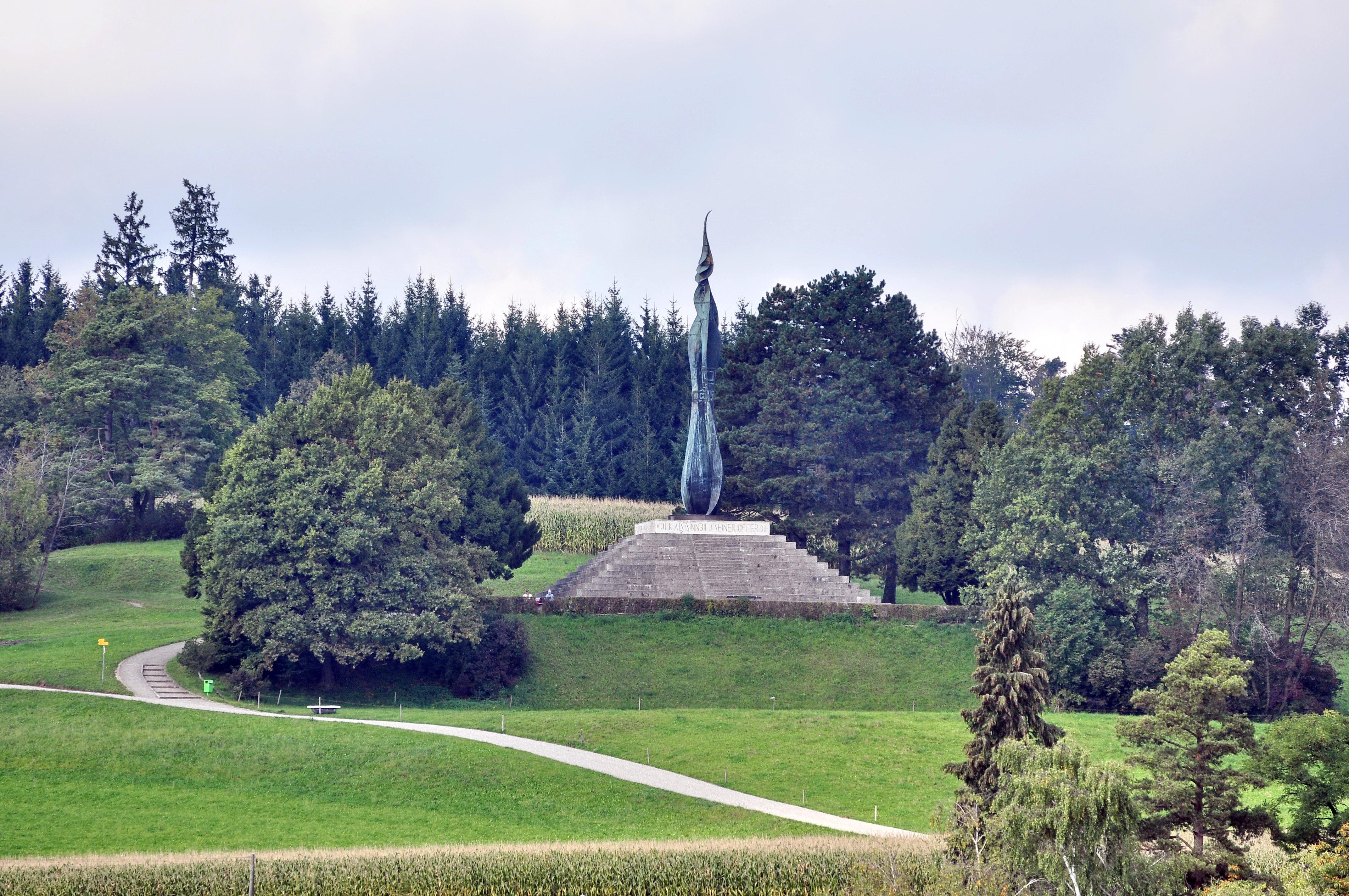 Wehrmännerdenkmal as seen from Forch (ZH) towards Guldenen on Pfannenstiel (Switzerland)